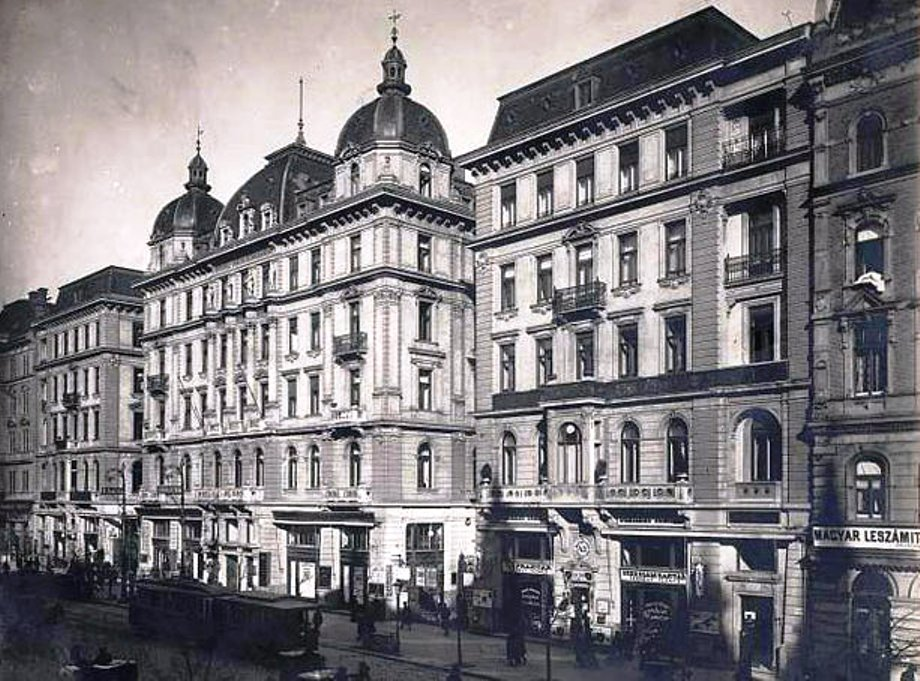 A Royal szálló 1900-ban, ma Corinthia Grand Hotel Royal néven luxusszálló. - Erzsébet krt. 43